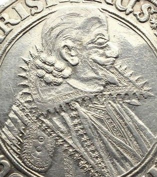 1 Thaler, Christian der Ältere, Administrator von Minden. Welter 921.